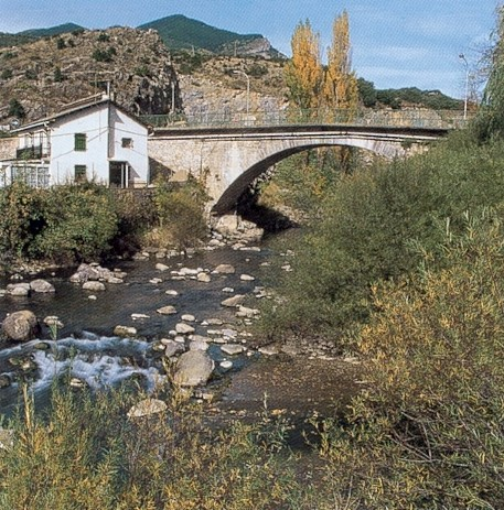 Villanua (Jacétanie, Aragon, Espagne) - Le vieux pont.